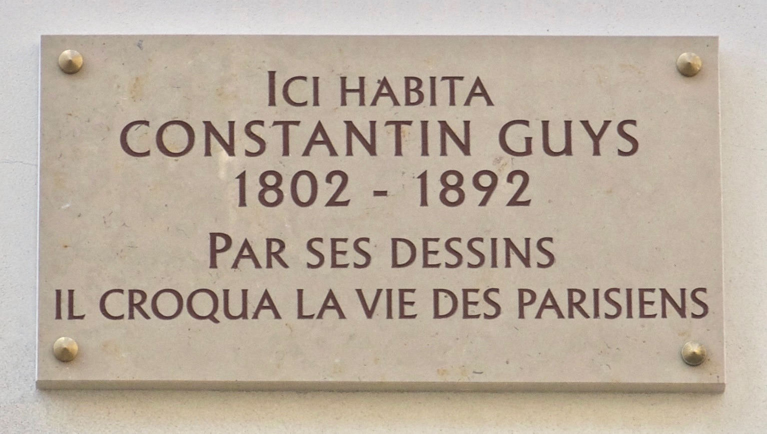 Plaque en hommage au peintre Constantin Guys, n°80 rue de Provence (Paris, 9e).